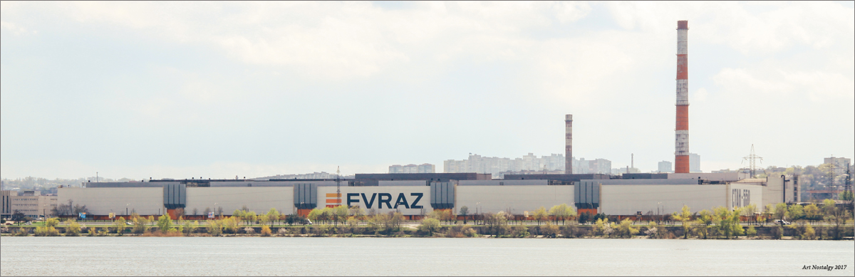 вид на цех Стан 550